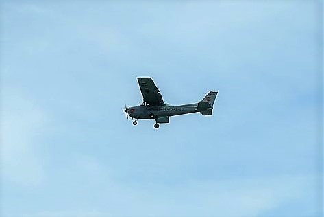 Flugzeug der Verteidigungskräfte Osttimors F-FDTL, eine Cessna 172P, Kennzeichen 4W-FAT